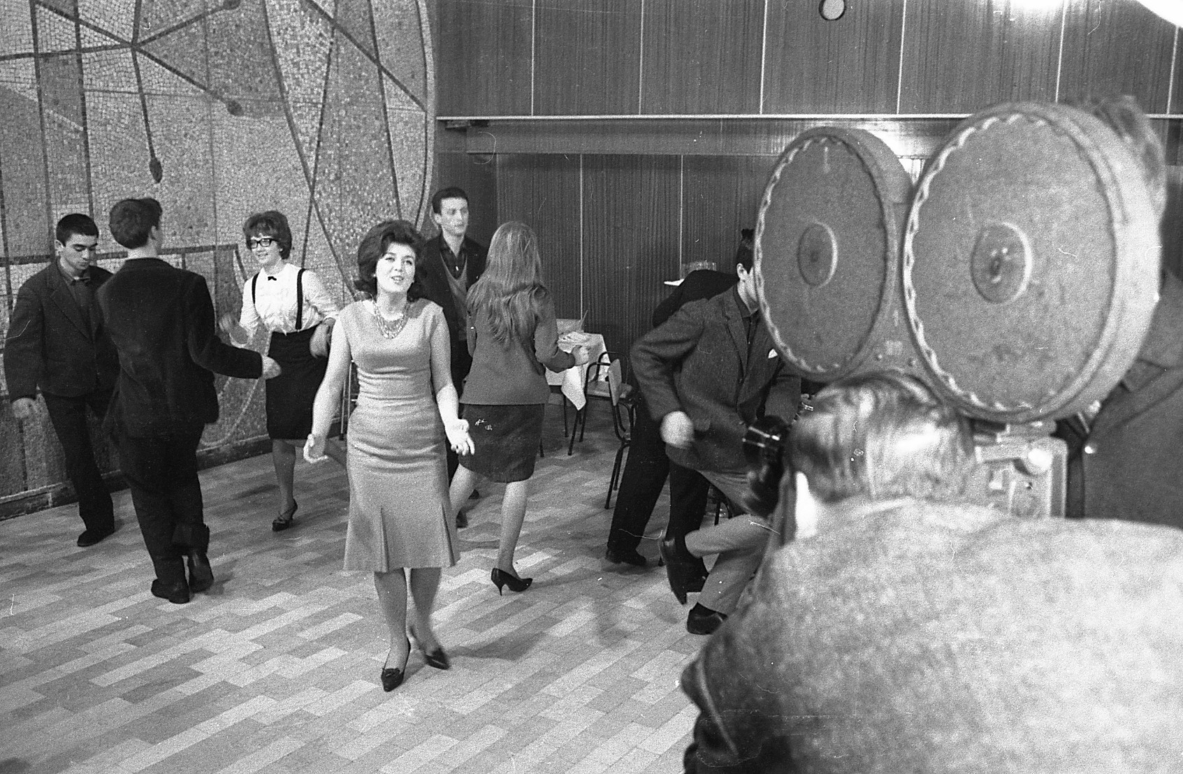 Radmila Karaklajić, pevačica, 1963, snimanje za Tv i tonska kamera.Foto:Stevan Kragujević (po odobrenju kćerke Tanje Kragujević)